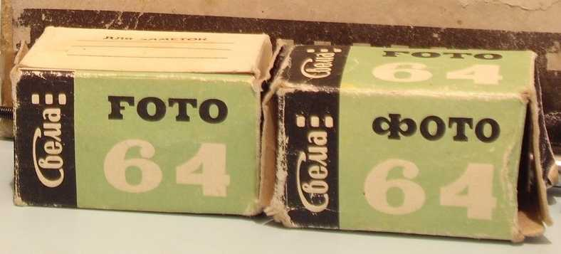 Черно-белая пленка СВЕМА 64